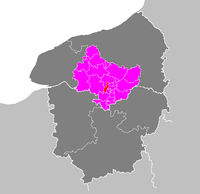 Maps of arrondissements and cantons of France: Arrondissement de Rouen - Canton de Maromme.PNG